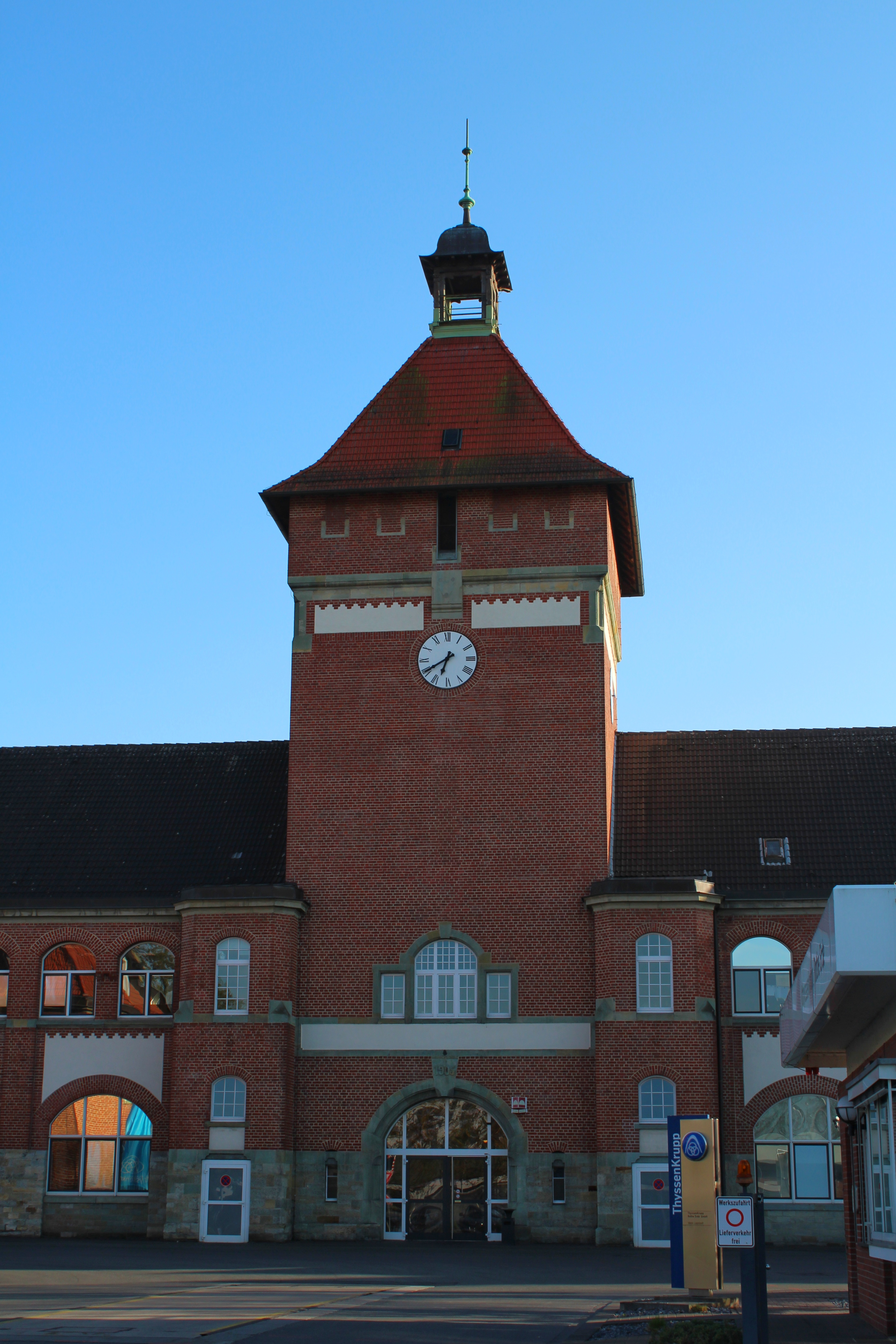 ThyssenKrupp Rothe Erde/Turm der ehemaligen Artillerie Werkstätten, Lippstadt This is a photograph of an architectural monument.